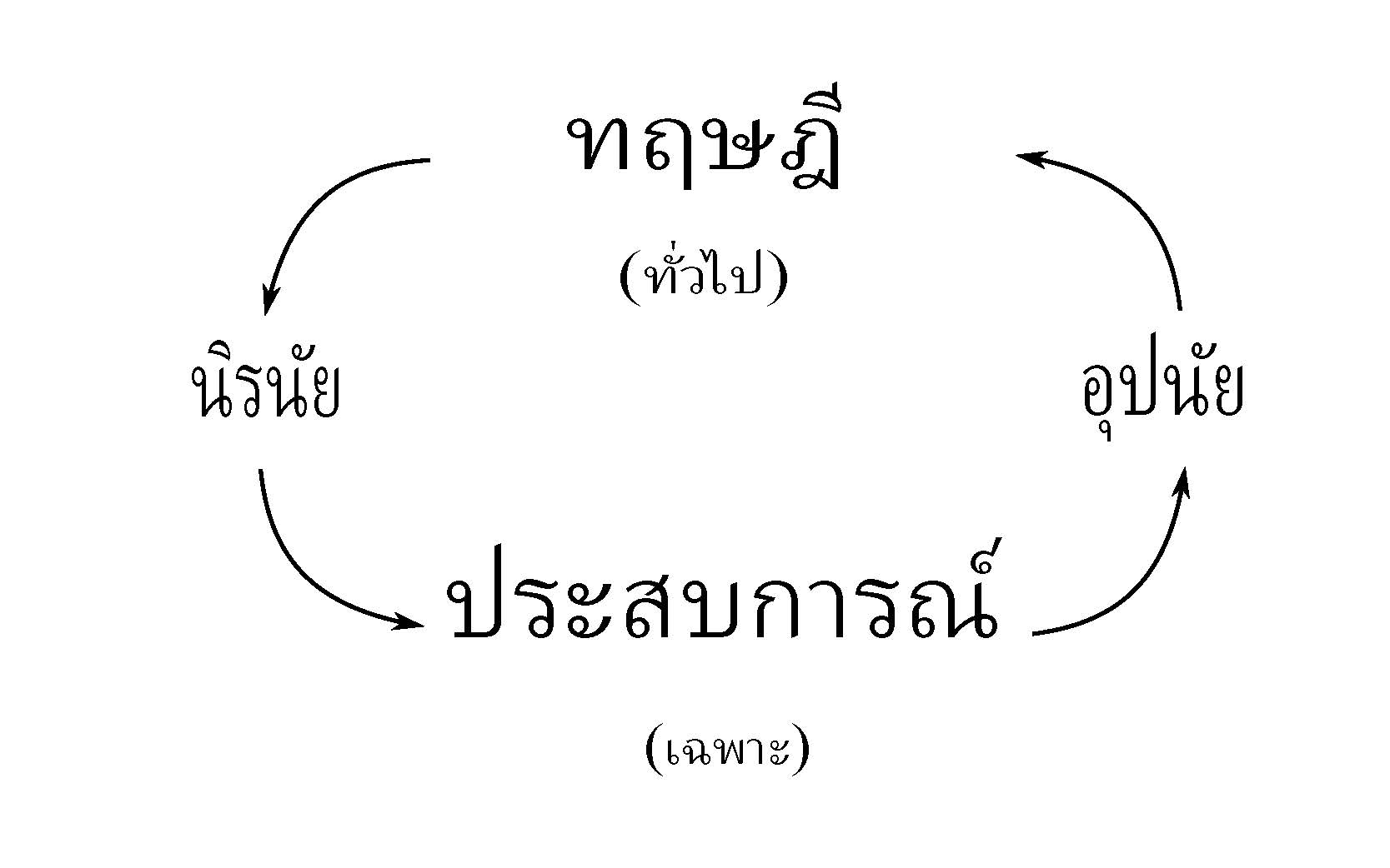 ผังการให้เหตุผลแบบนิรนัยและอุปนัย